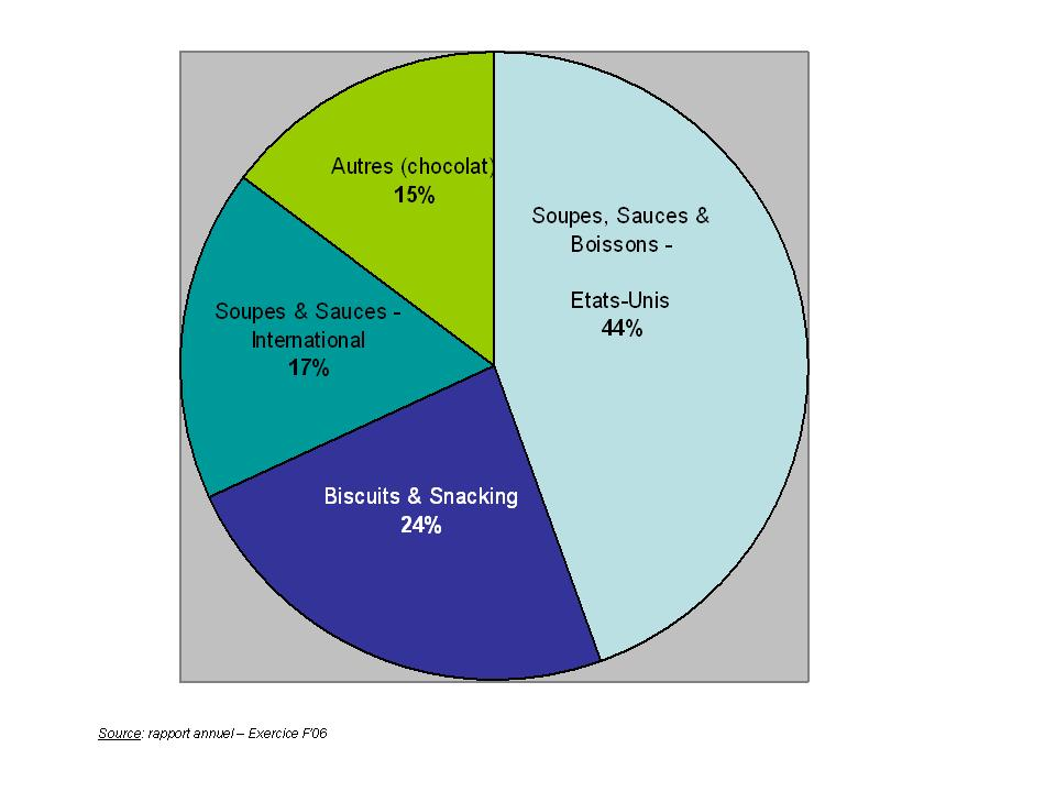 réalisation personnelle basée sur Rapport Annuel exercice F'06 présent sur site Campbell's